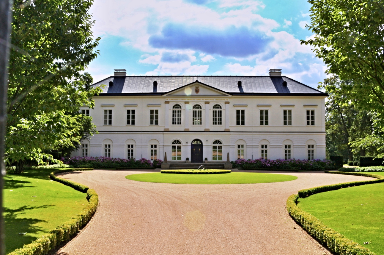 Zámek Šénvald, Jinošov